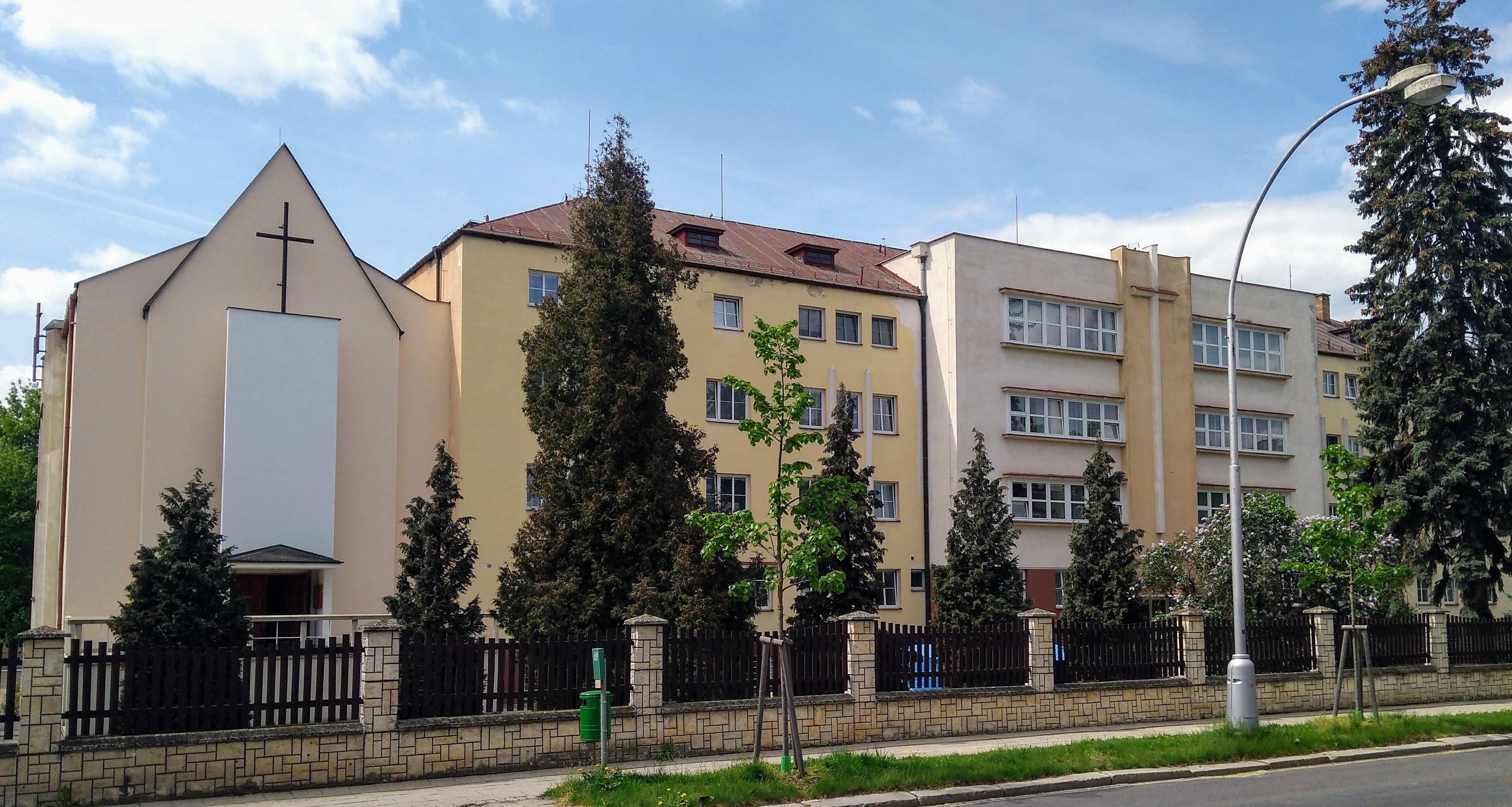 Budova kláštera povýšení svatého Kříže